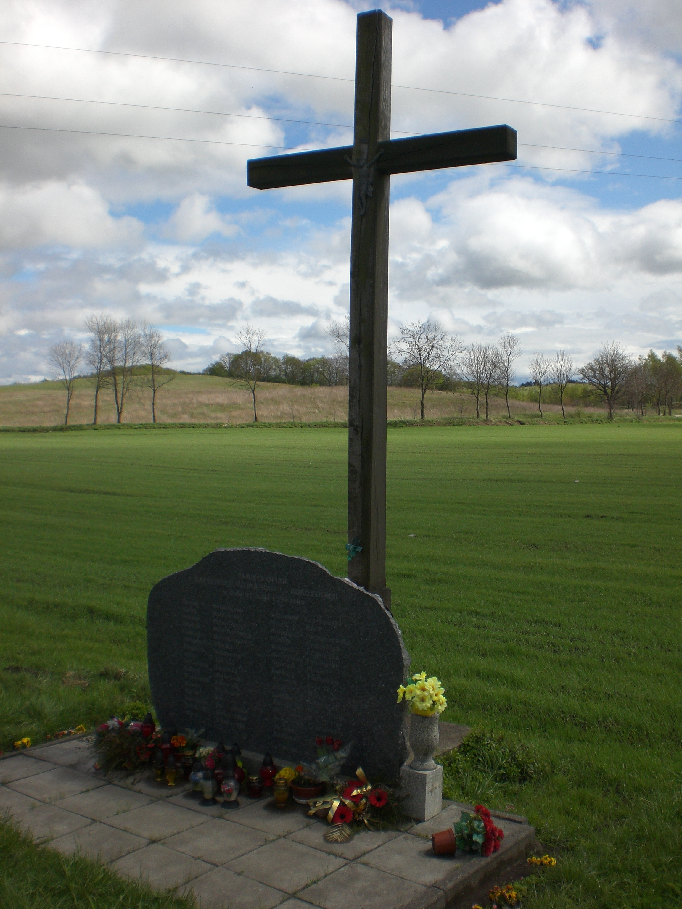 Gdańsk Kokoszki miejsce katastrofy autobusu PKS przy DK7